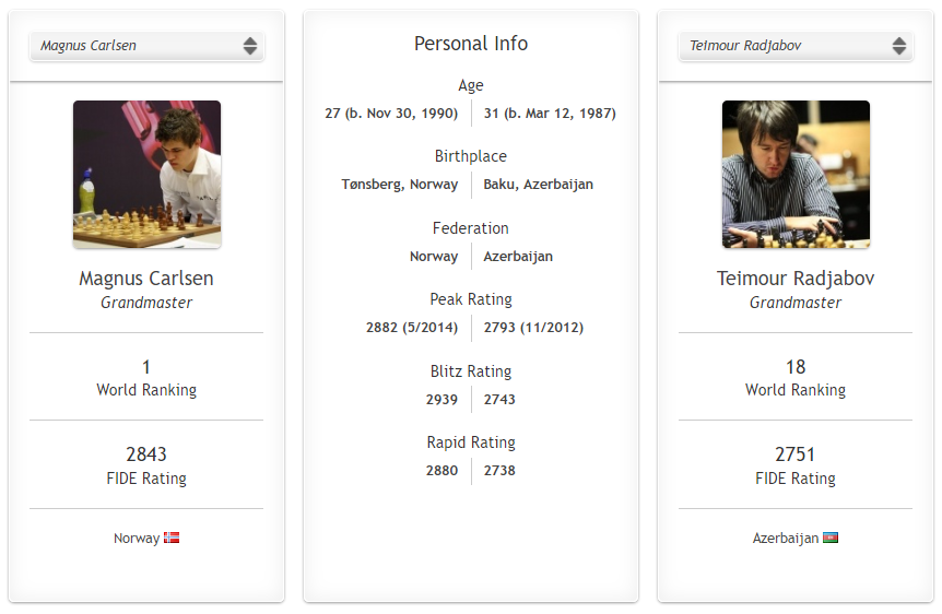 muqayise